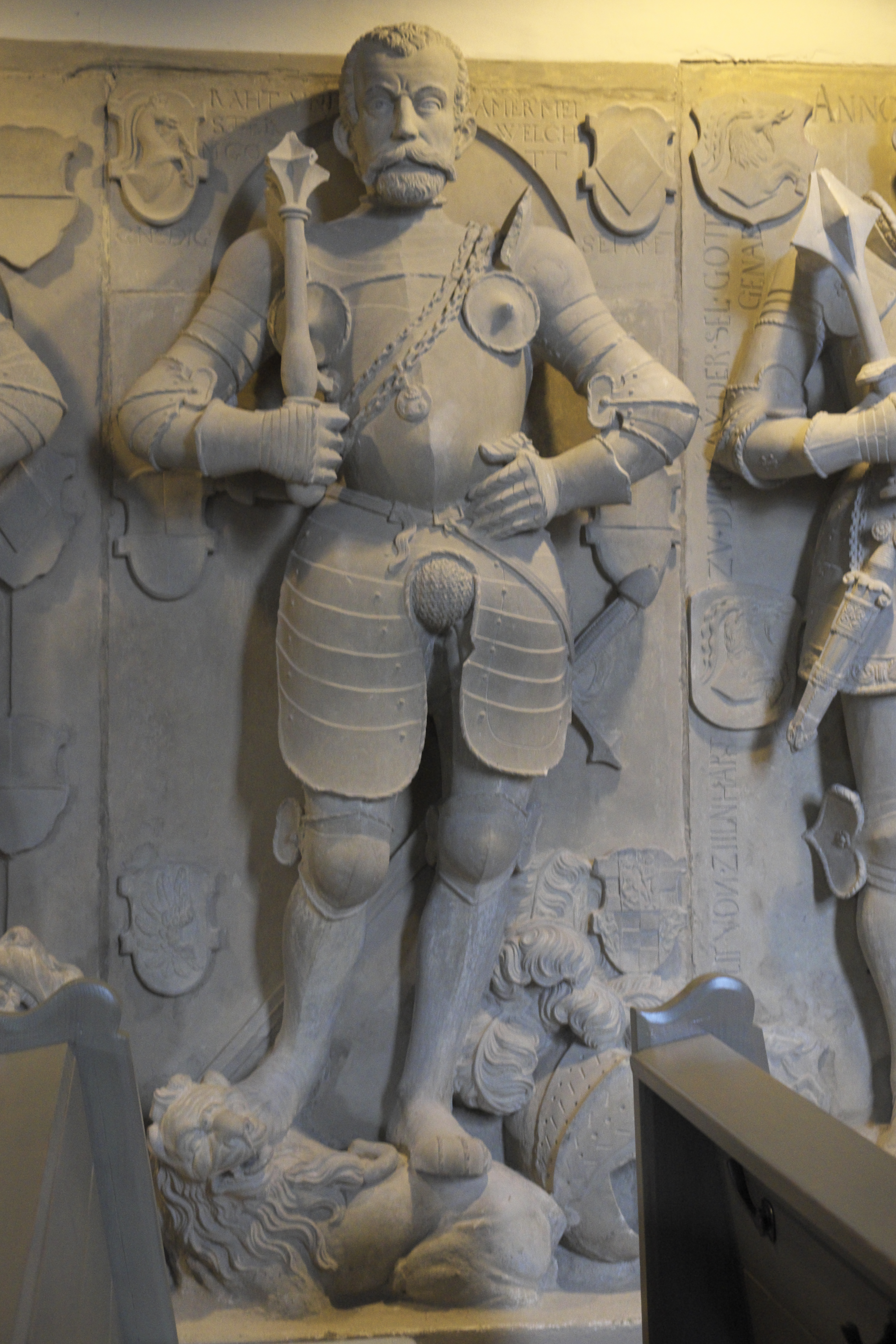 Evangelische Kirche St. Cyriakus und St. Kilian in Dürnau im Landkreis Göppingen (Baden-Württemberg/Deutschland), Grabdenkmal der Herren von Zillenhardt